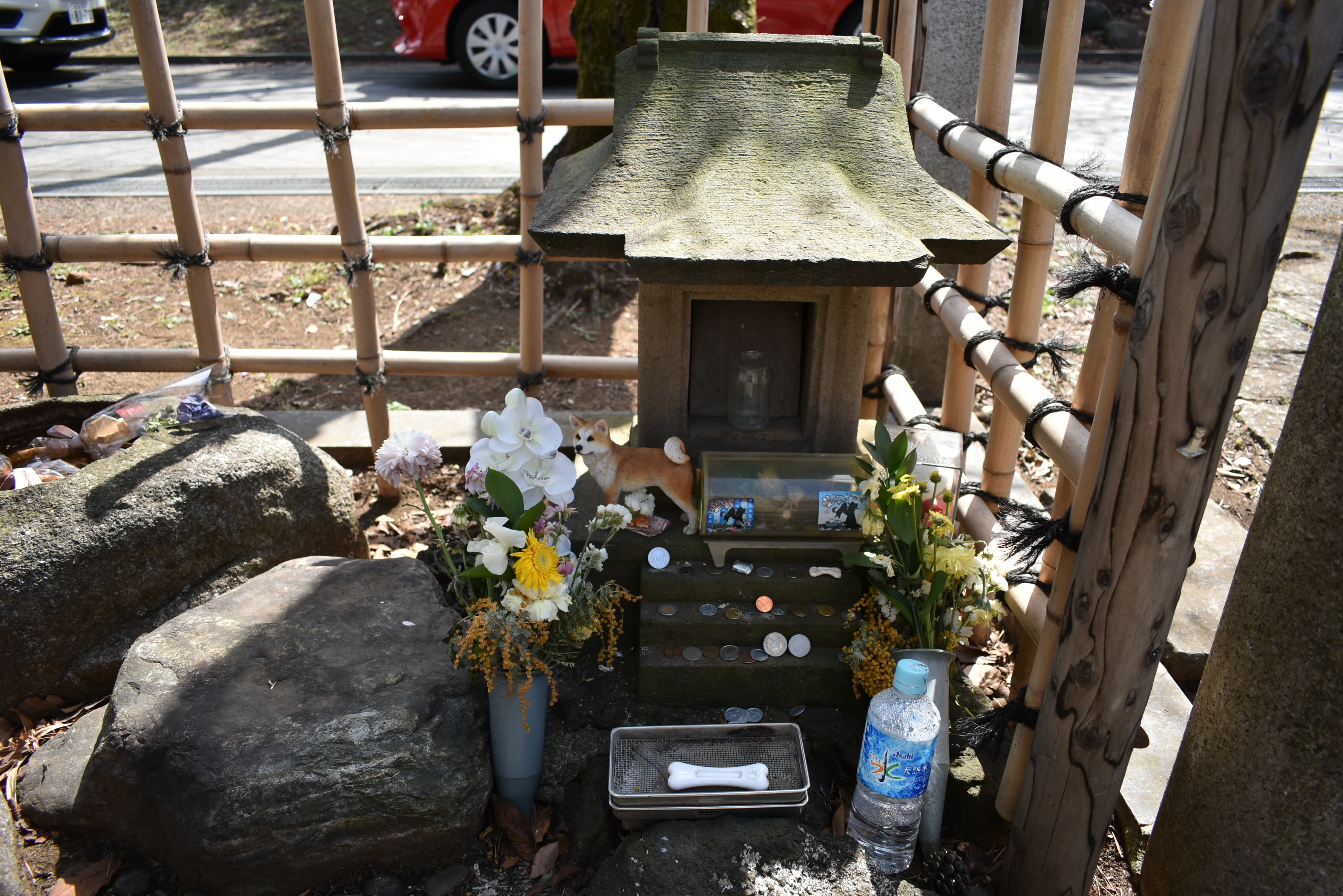 青山墓地 忠犬ハチ公 Nikon D3400